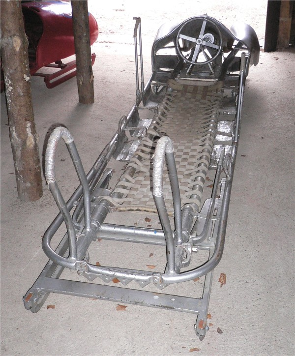 Weltmeister Bob von Oslo 1952.